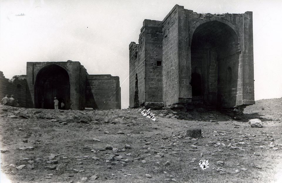 Balaxanı kəndində məscid və türbə, 1940-cı illər